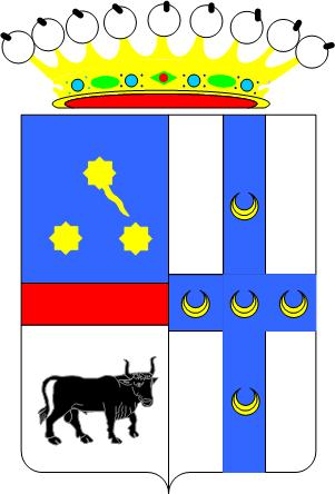 Stemma Bufalari